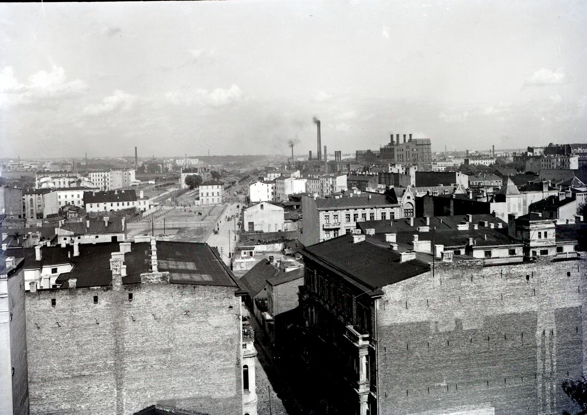 Łódź, widok z hotelu "Savoy" na wschód